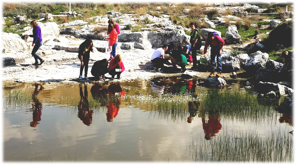 בריכת צרטה תלמידים דוגמים במסגרת פעילות לימודית בבריכת צרטה